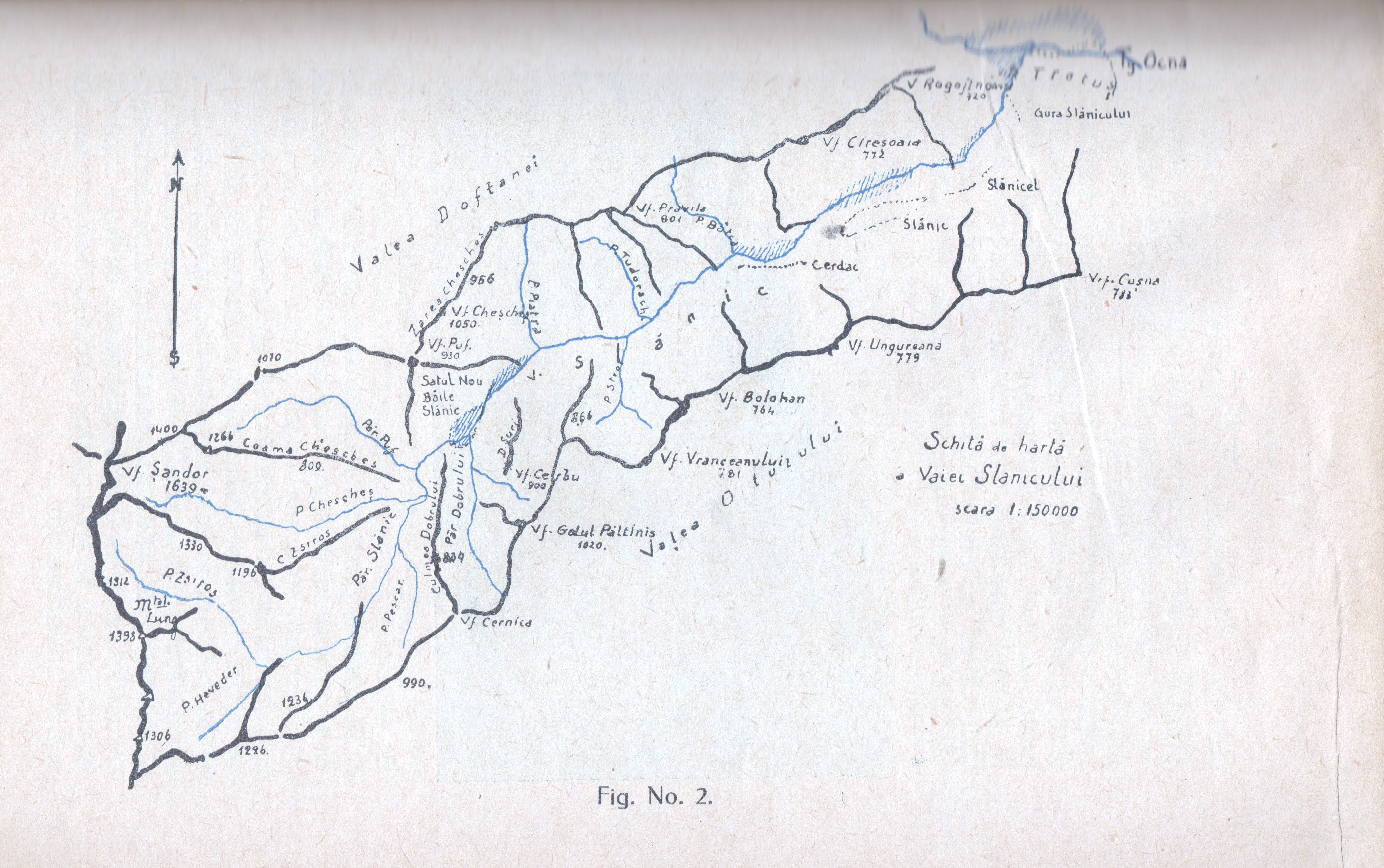 Harta cu datele geografice văii Slănicului din județul Bacău. Fundal hârtie scos în Photoshop CS6.